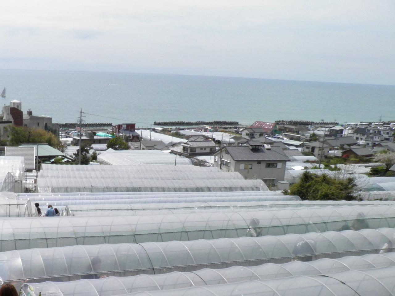 久能から太平洋